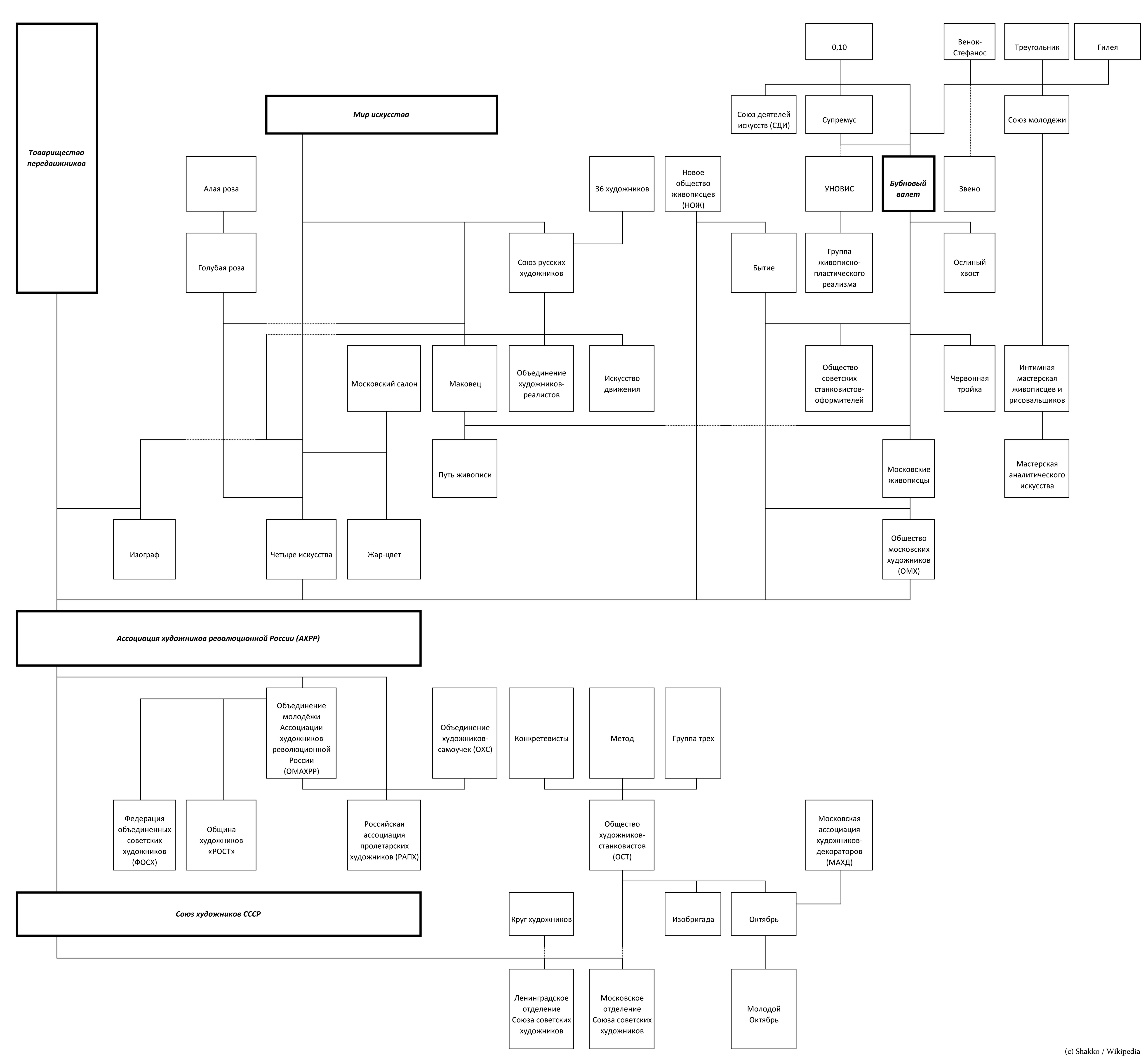 Схема художественных объединений русского искусства ХХ века